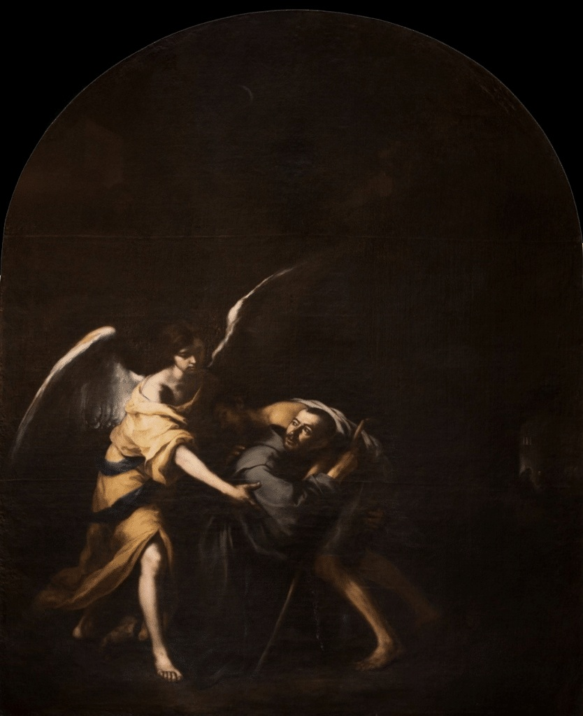 La obra representa a San Juan de Dios (1495-1550), de orígen portugués y fundador de la Orden Hospitalaria de San Juan de Dios. En la obra, el santo cae a tierra por llevar a un enfermo, y el Arcángel Gabriel aparece milagrosamente para ayudarle.